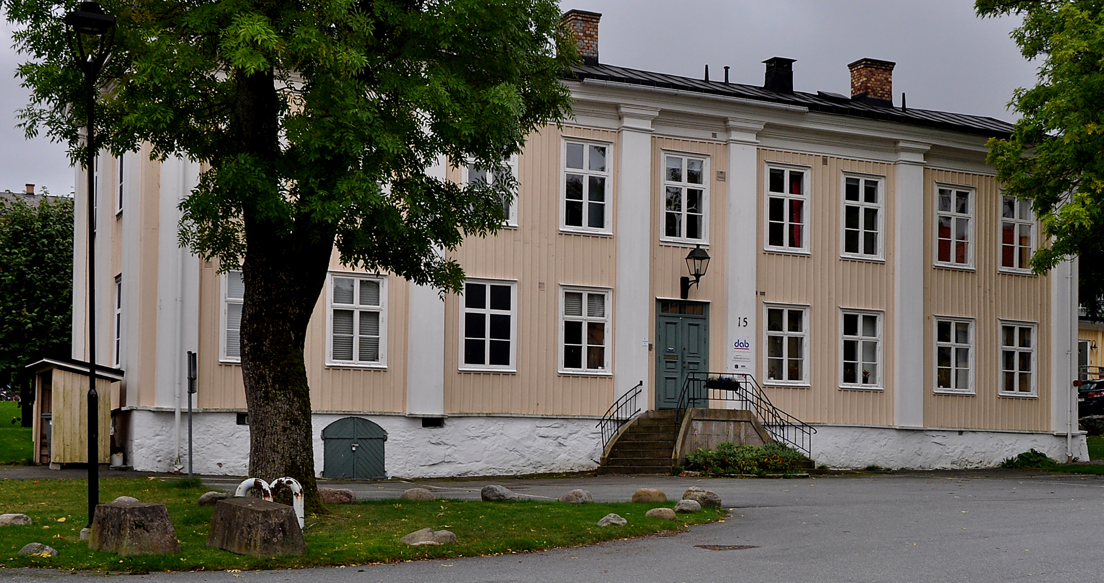 Örlogsbas, Kriminalvårdsanstalt, Örlogsvarv